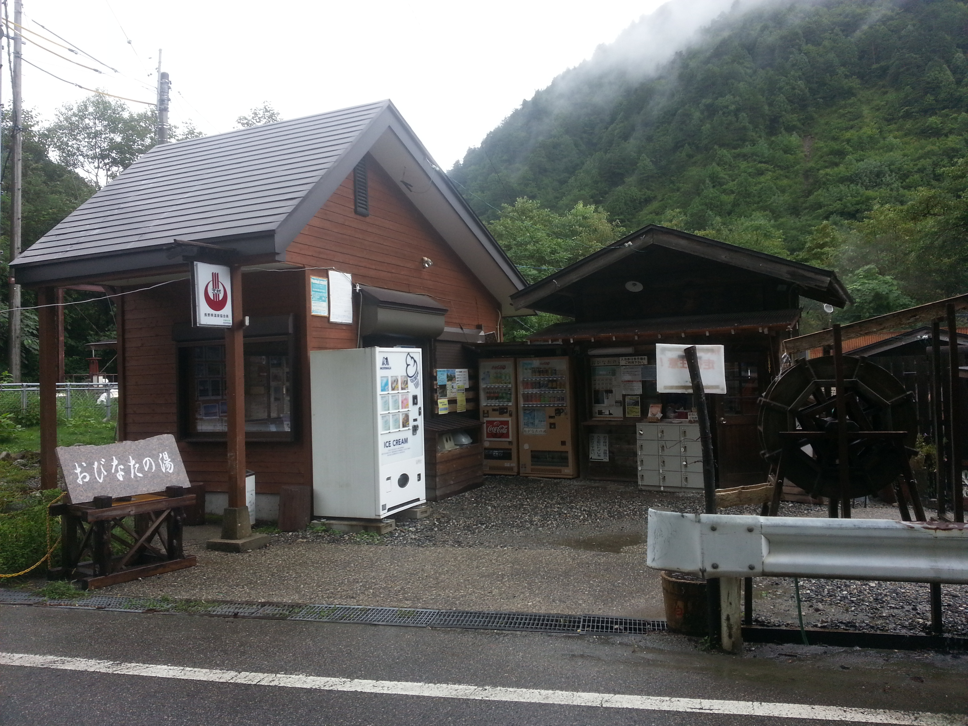 おびなたの湯の入り口。